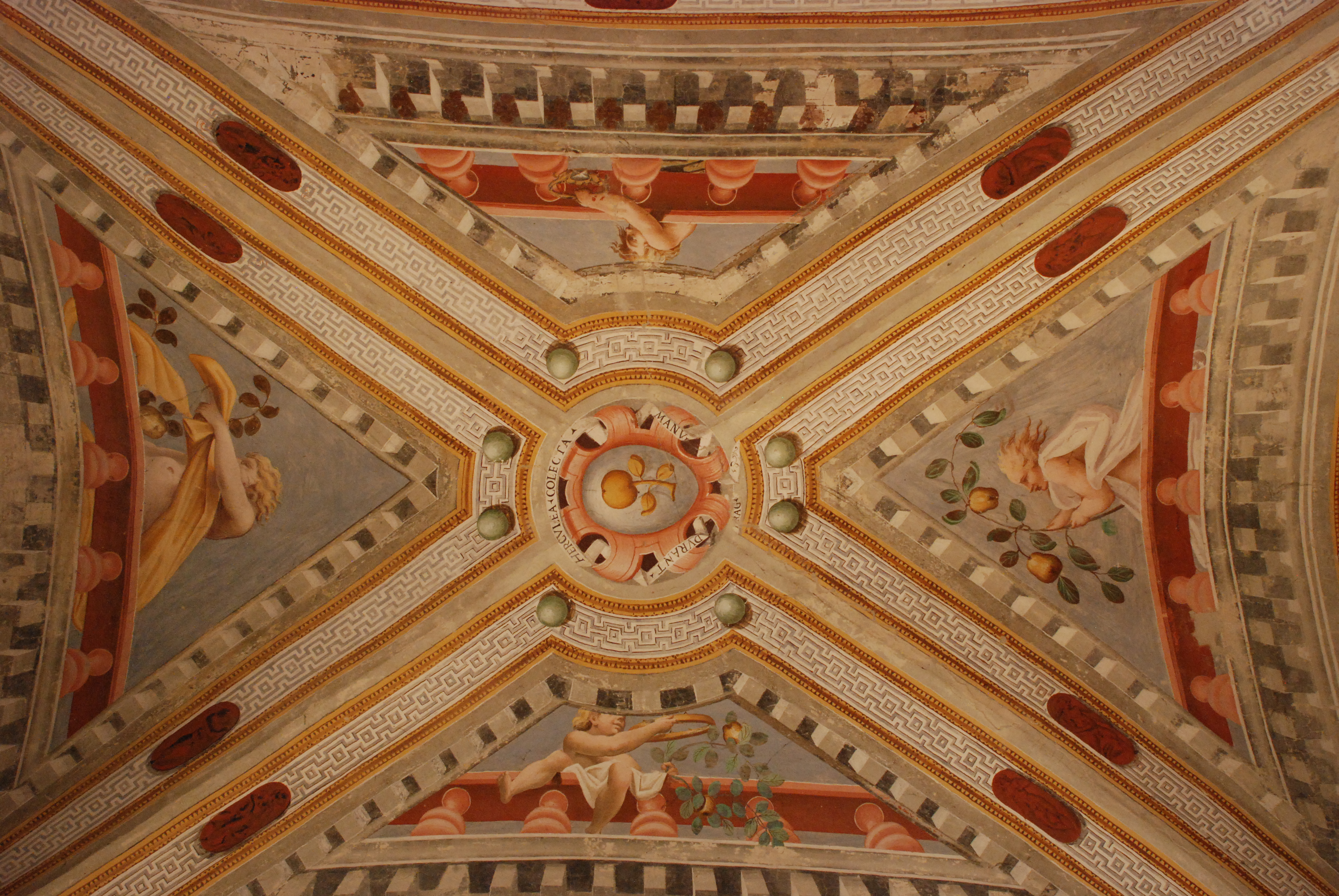 Castello di Torrechiara - MIBAC Camera degli Angeli, il soffitto This is a photo of a monument which is part of cultural heritage of Italy.